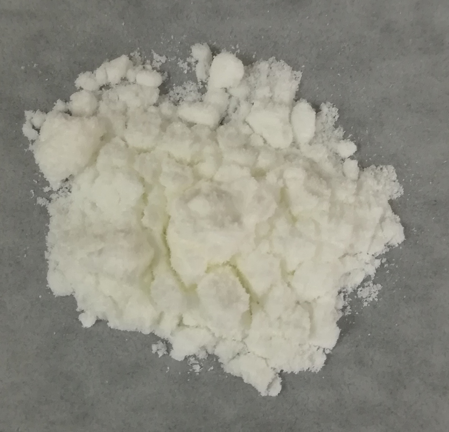 中文（中国大陆）: 3-氨基-1,2,4-三唑，纯度99%. CAS: 61-82-5。